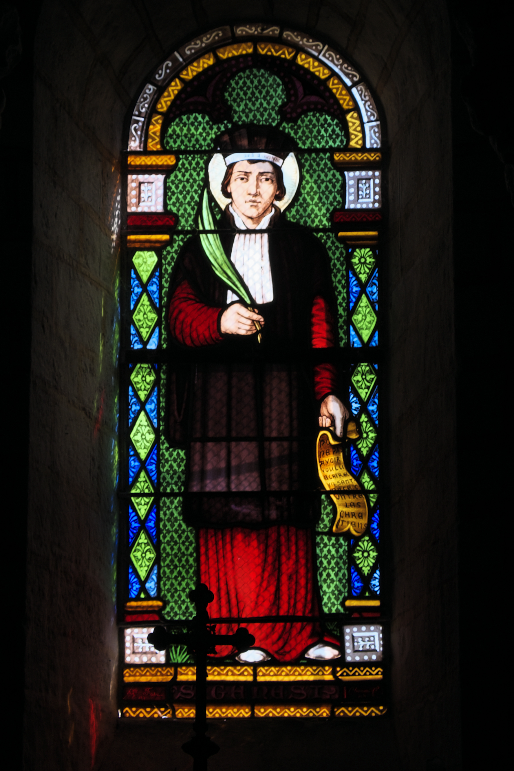 Katholische Pfarrkirche Saint-Jean in Glaine-Montaigut im Département Puy-de-Dôme (Auvergne-Rhône-Alpes/Frankreich), Bleiglasfenster